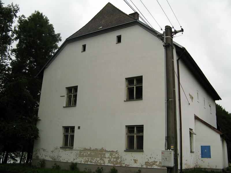 Tvrz, Budkov 19, Budkov (Střížovice).